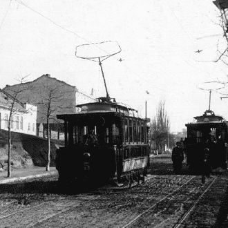 трамвай по вулиці Личаківській у Львові